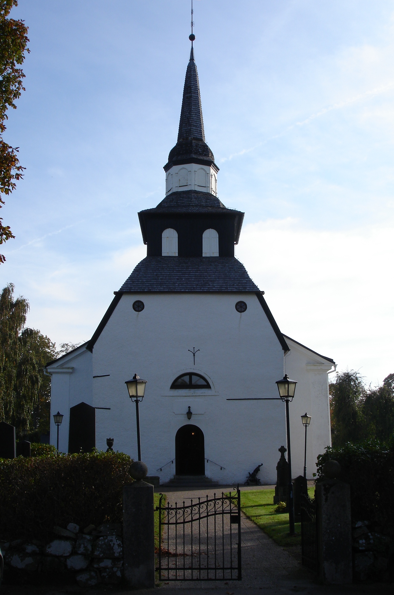 Ränneslövs kyrka i Södra halland